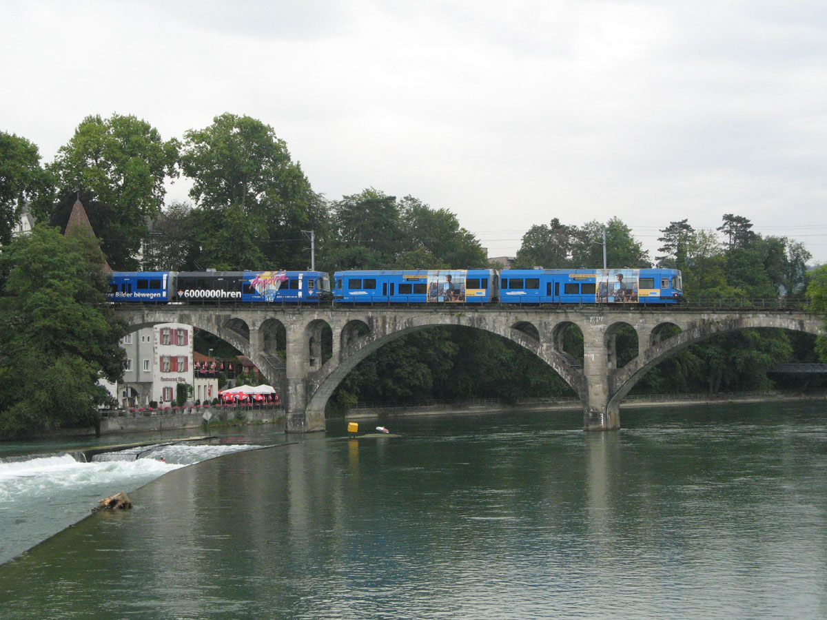 Ein Zug der Bremgarten-Dietikon-Bahn fährt über die Bremgarter Reussbrücke in Richtung Wohlen. Werbelackierung Radio Argovia und Neue Aargauer Bank.